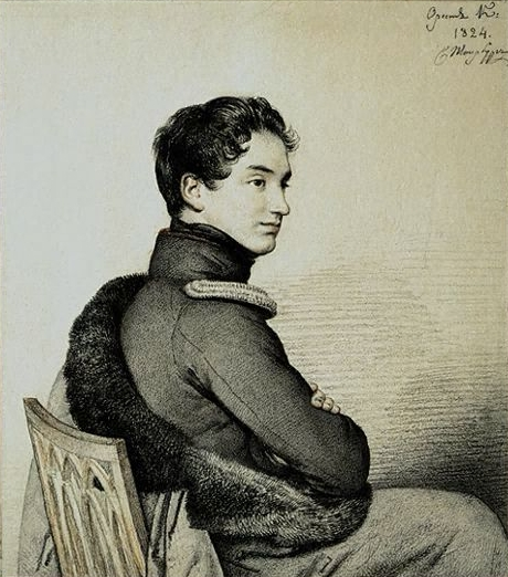 Бутурлин Сергей Петрович